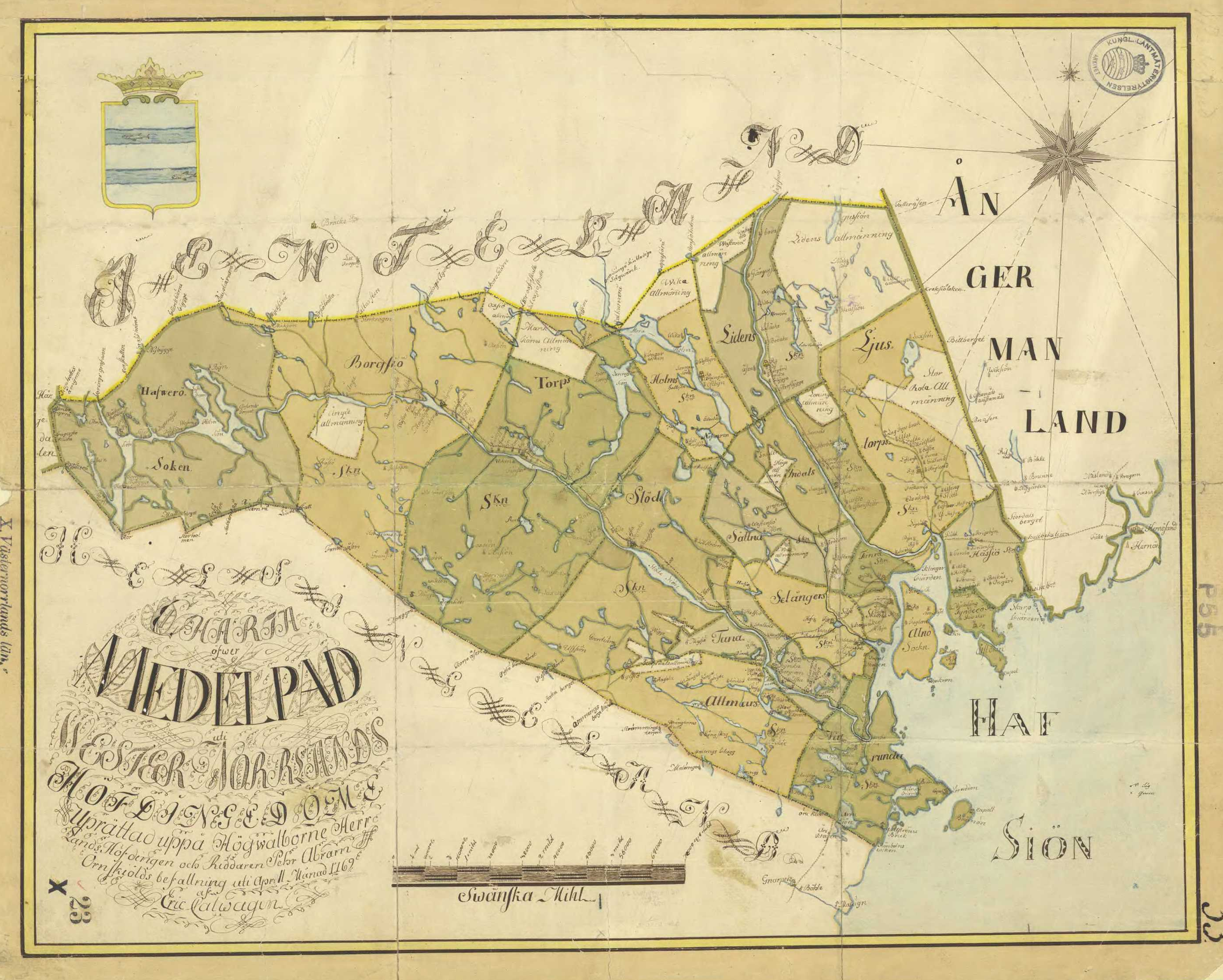 Äldre karta över Medelpad.